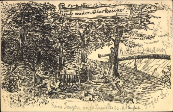 Gezeichnete Postkarte mit dem Spruch "Gruß von der Naturkneipe".